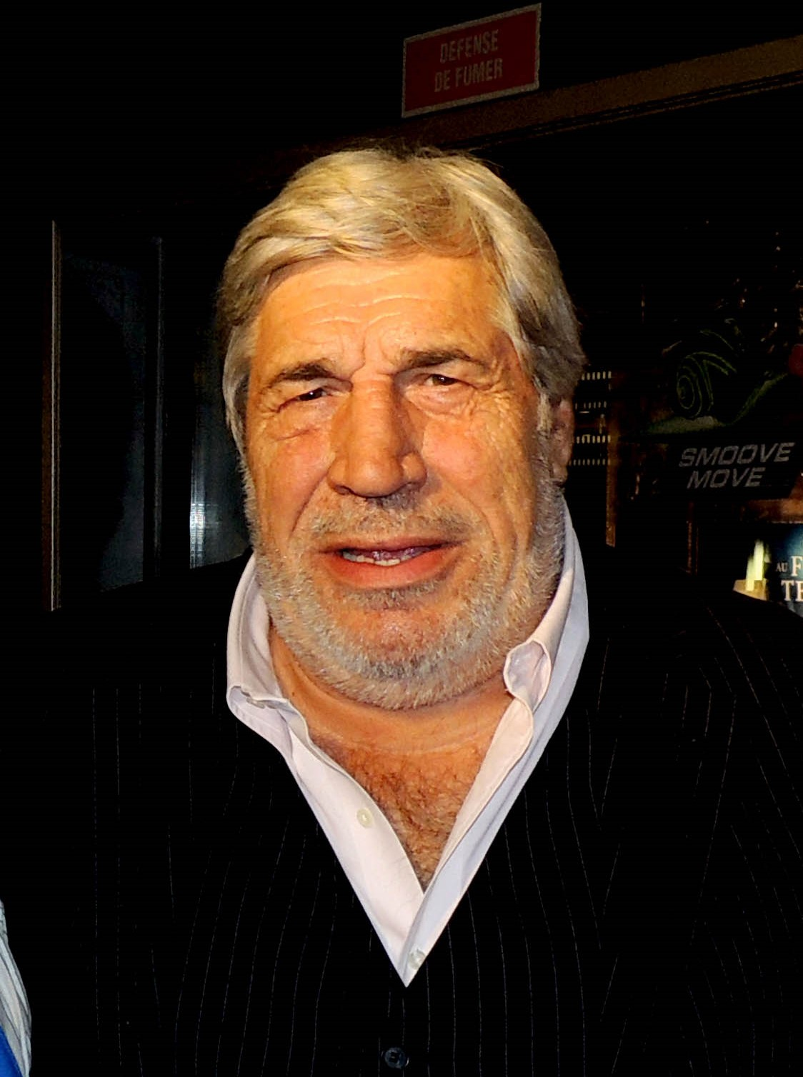 Jean Pierre Castaldi.